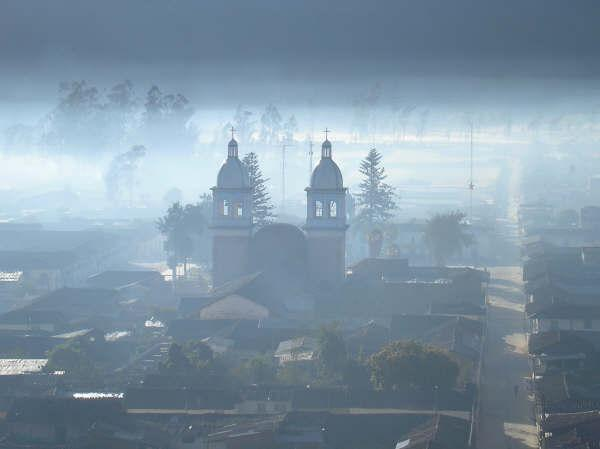 Amanecer de Celendín, una de las más importantes provincias de Cajamarca